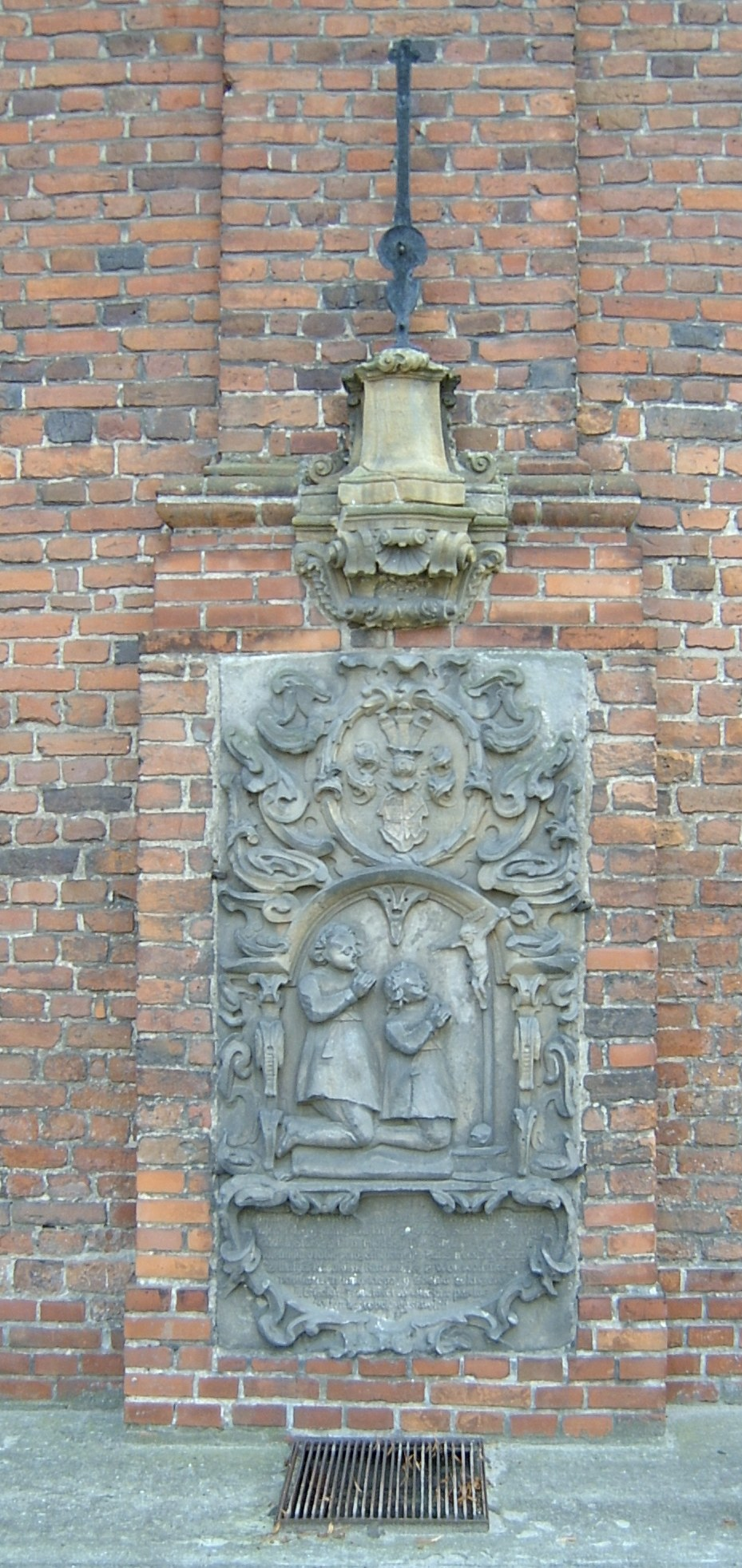 Schwetzkau (Święciechowa) – das älteste Grabmal des Święciechowas von 1639. Es ist eine etwa zwei Meter hohe Sandsteinplatte. Diese trägt die Inschrift „DOM“ (für „Deo Omnipotenti Maximo“ – dem allmächtigen Gott). Darunter stehen rechts die Worte „D. Lisieckich“ und links „D. Radowickich“. Zwischen diesen Worten befindet sich das Wappen der Grzymała. Unter diesem Wappen befindet sich ein Relief zweier vor einem Kreuz kniender Kinder. Der Text, der sich darunter befindet, lautet auf deutsch: Maciej und Mikołaj Radowicki, zwei Brüder, haben im Alter von dreieinhalb und zweieinhalb Jahren, der ältere am 11. und der jüngere am 12. Mai 1639, dem Tode ihren Zoll entrichtet und wurden hier in einem Grabe beigesetzt. Ihnen haben die trauernden Eltern Maciej Radowicki aus Klein Radowick, Wojewodschaft und Kreis Kulm, und Sofia Liciecka aus Koszew in Liebe zum ewigen Gedächtnis diesen Grabstein gesetzt (Johannes Schulz, 1971, S. 97)